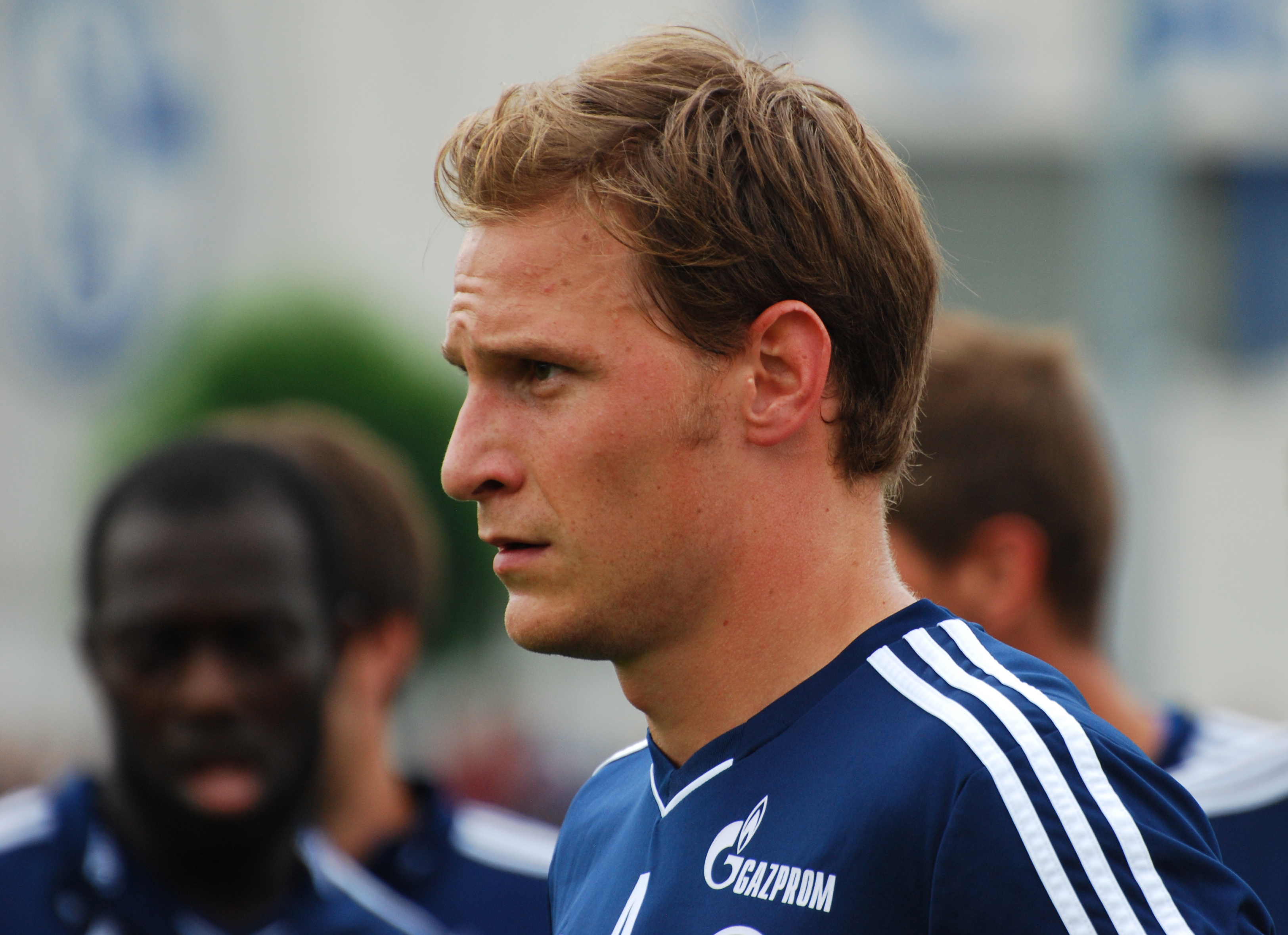 Benedikt Höwedes